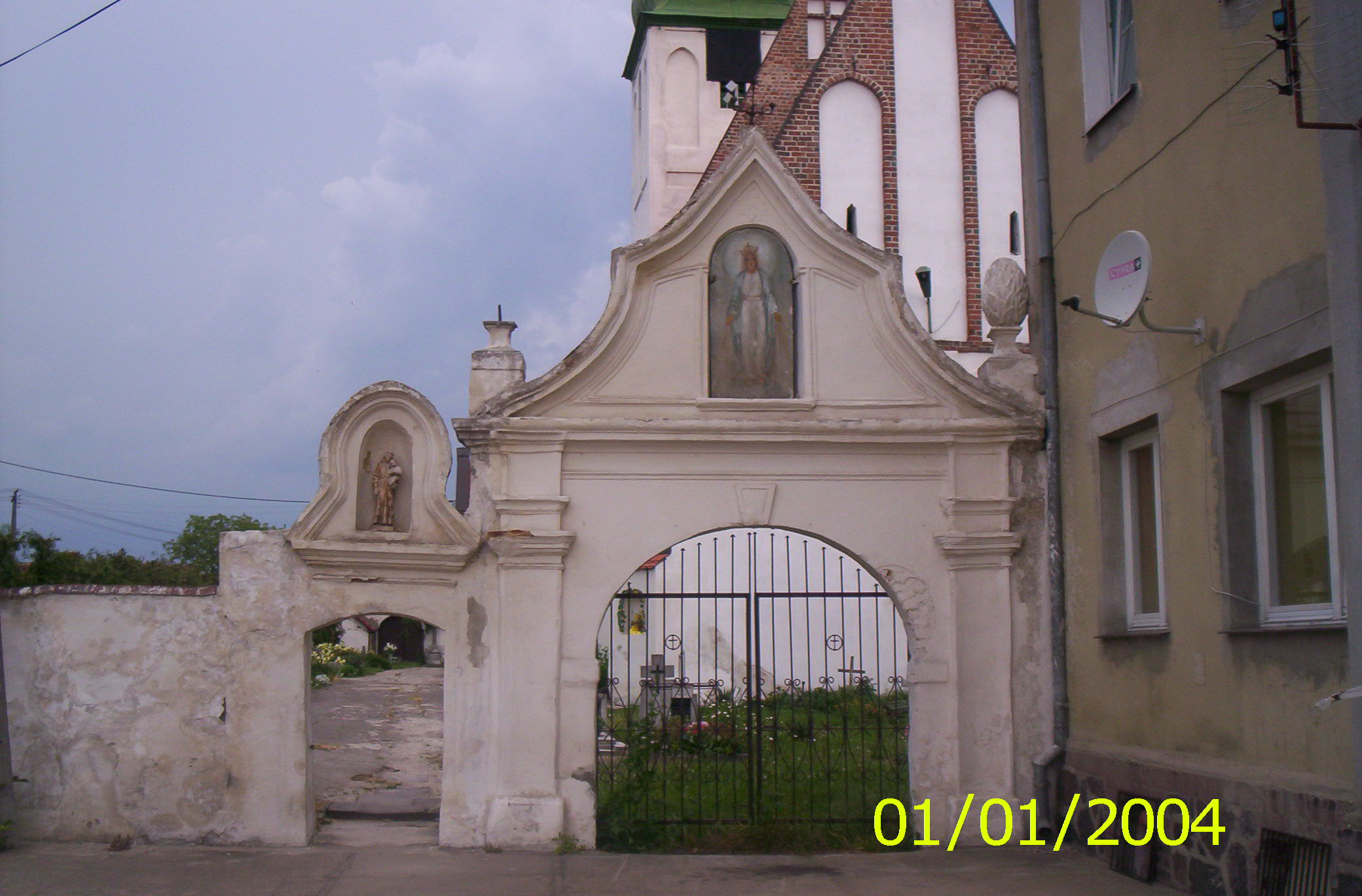 Brama wschodnia kościoła pod wezwaniem św. Michała Archanioła w Kwielicach